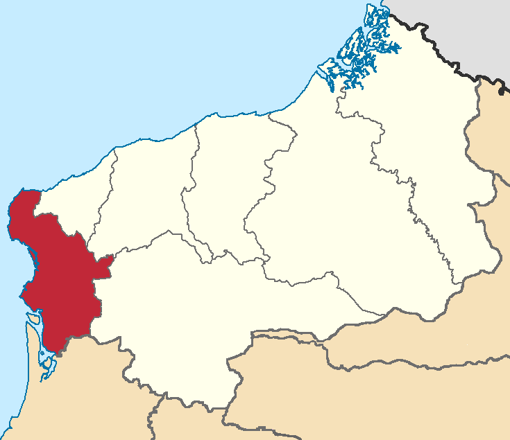 Mapa localizacor del cantón Muisne, Esmeraldas, Ecuador